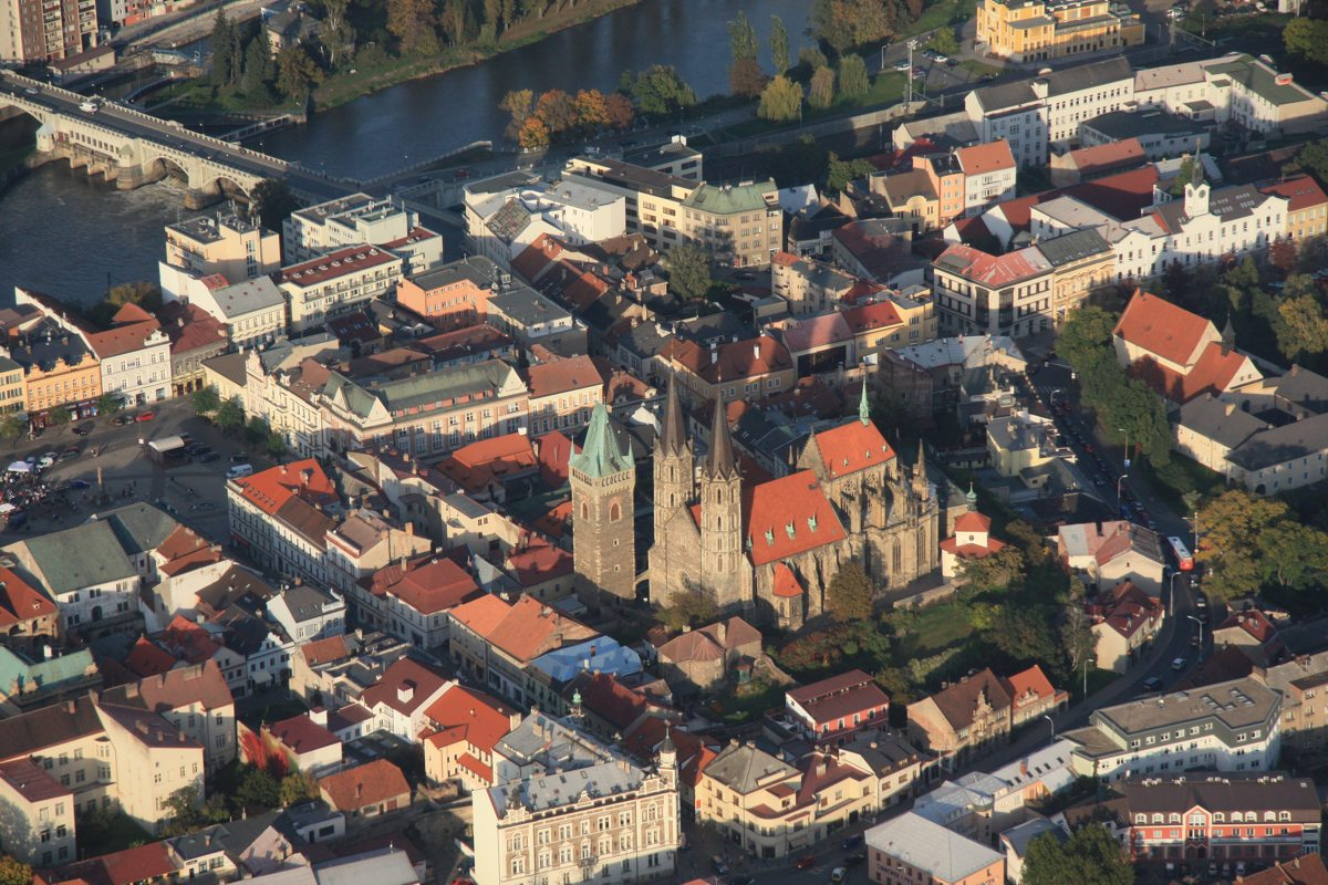 Kolín